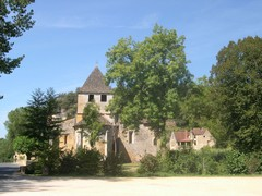 Église Saint Caprais